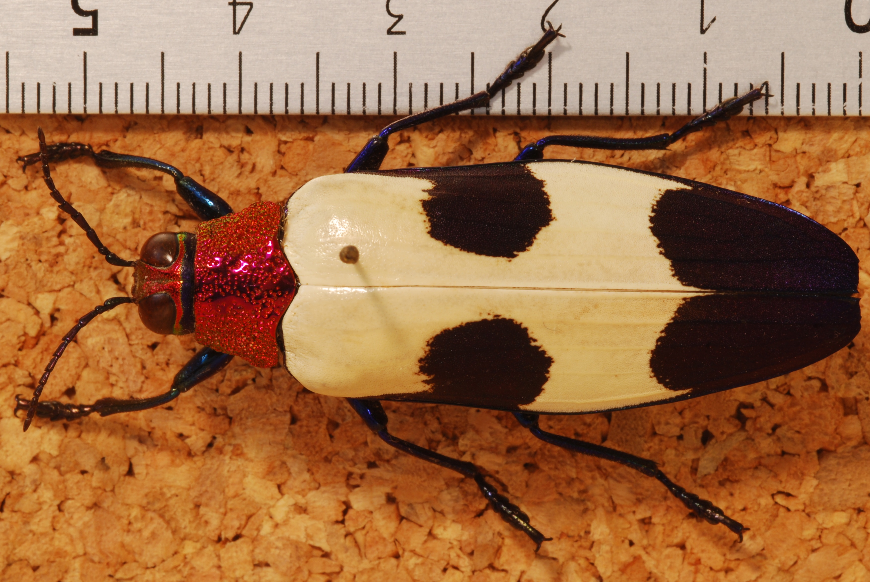 San Sai, Chiang Mai, THAILAND